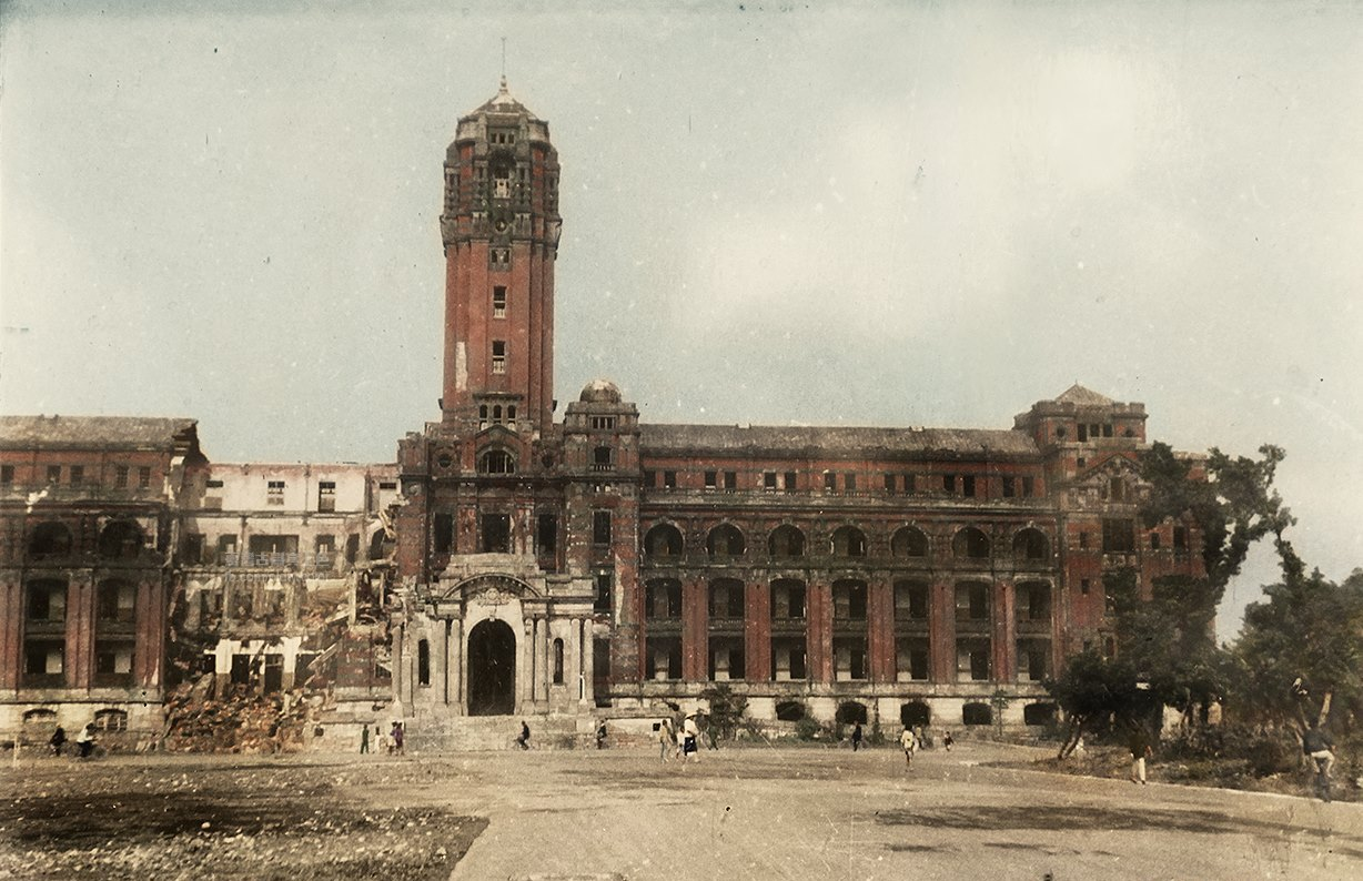 臺灣總督府建築遭盟軍轟炸受損情形。